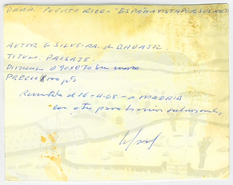 Datos técnicos del Paisaje remitido a Madrid el 16 de abril de 1968 con destino a la exposición "España Vista por sus Artistas", celebrada en San Juan de Puerto Rico entre abril y mayo de ese año.